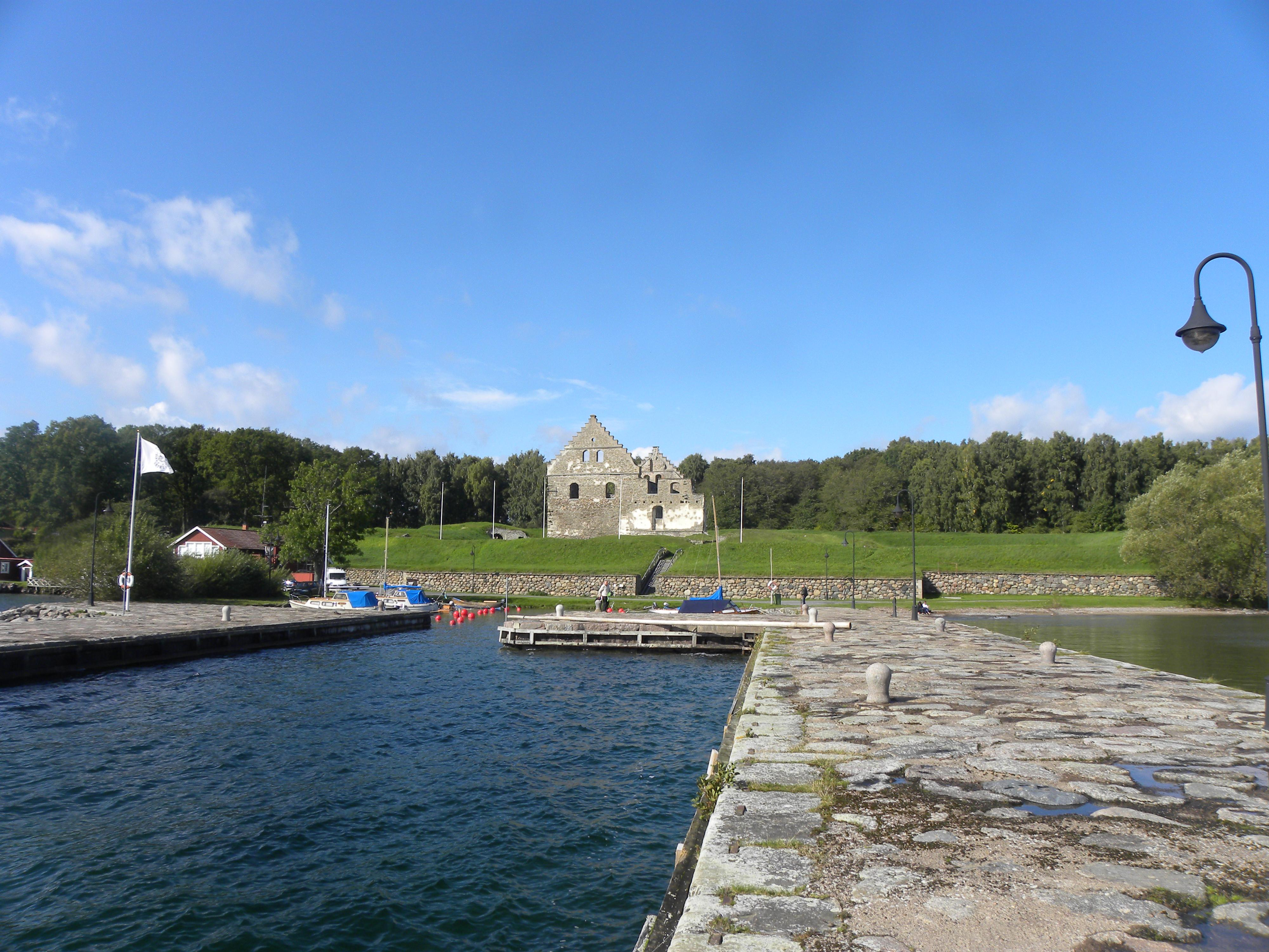 Ruine Visingsborg